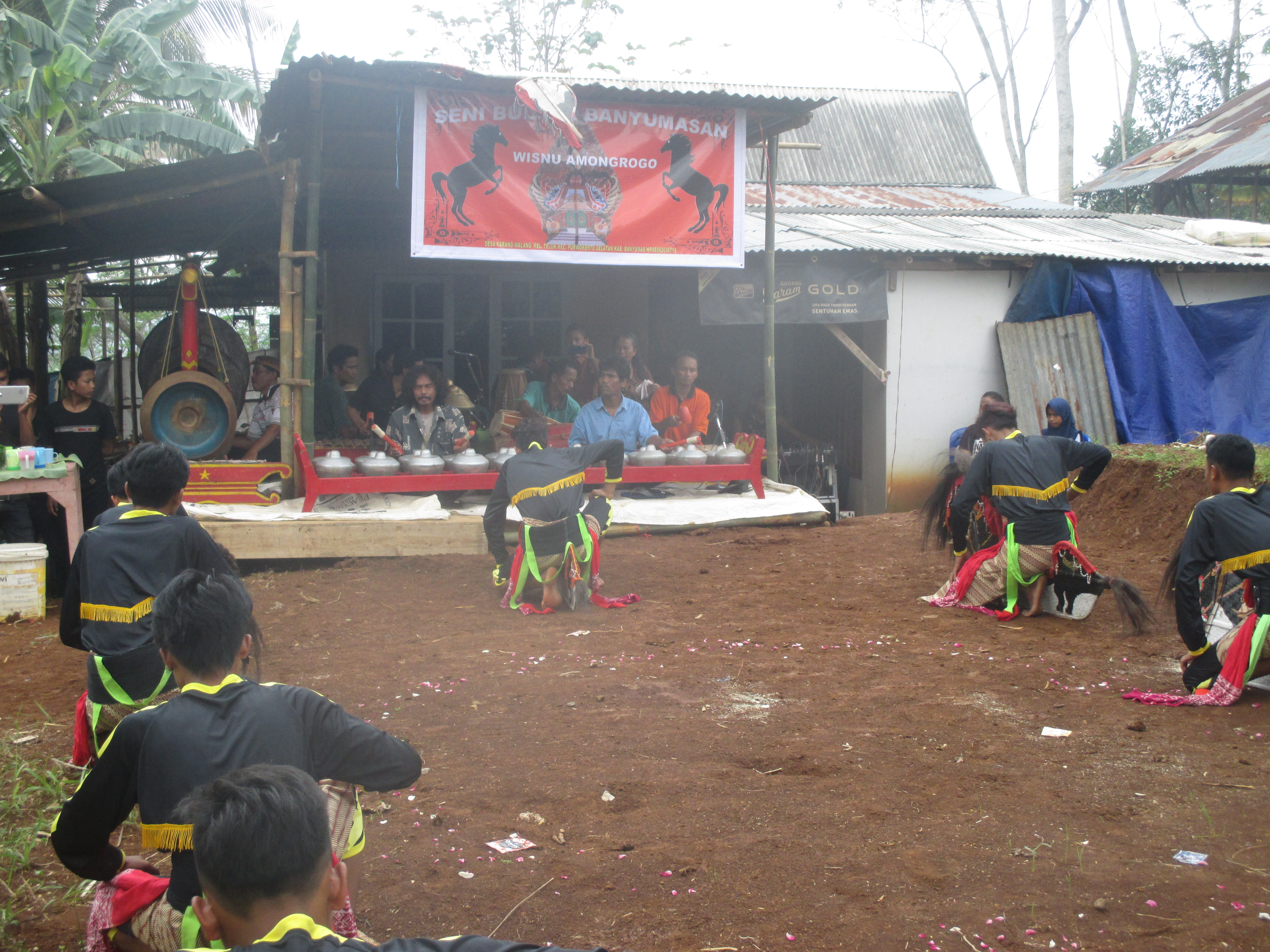 kesenian kuda kepang banyumasan